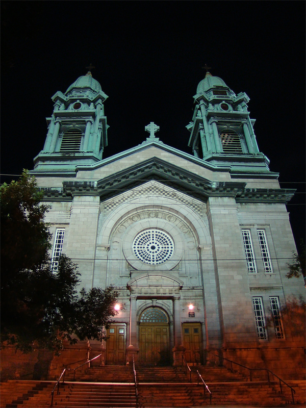 Église Très-Saint-Rédempteur, sise au 3530 Rue Adam, Montréal, Québec, Canada.